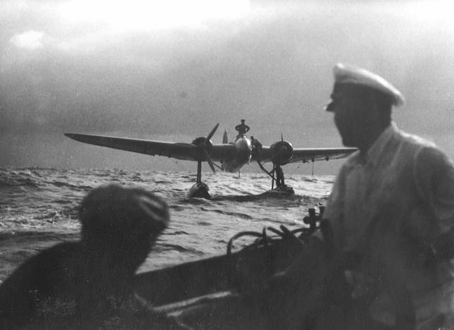 Das Flugzeug wird eingeschleppt